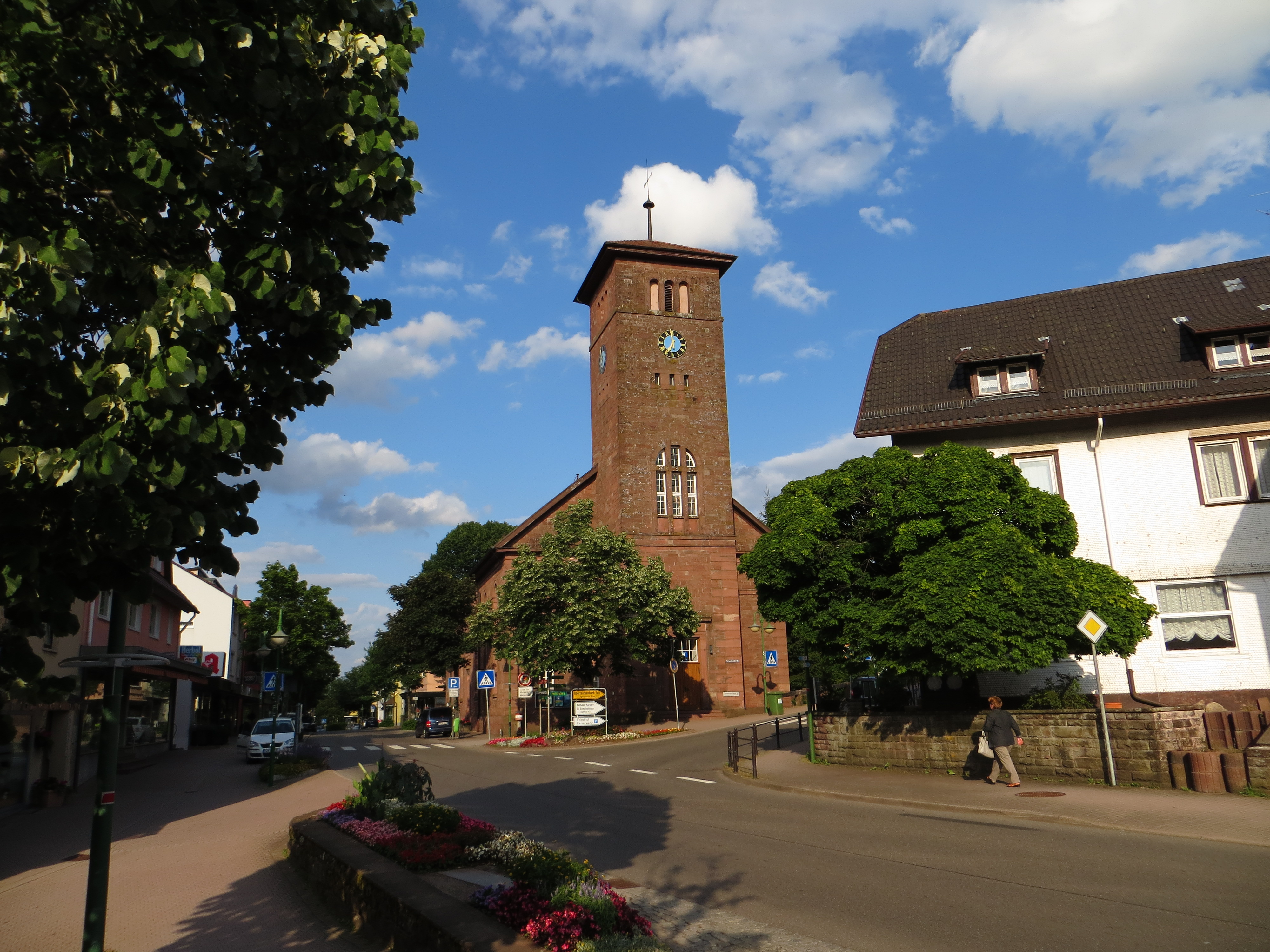 Evangelische Kirche in Schömberg (Kreis Calw)